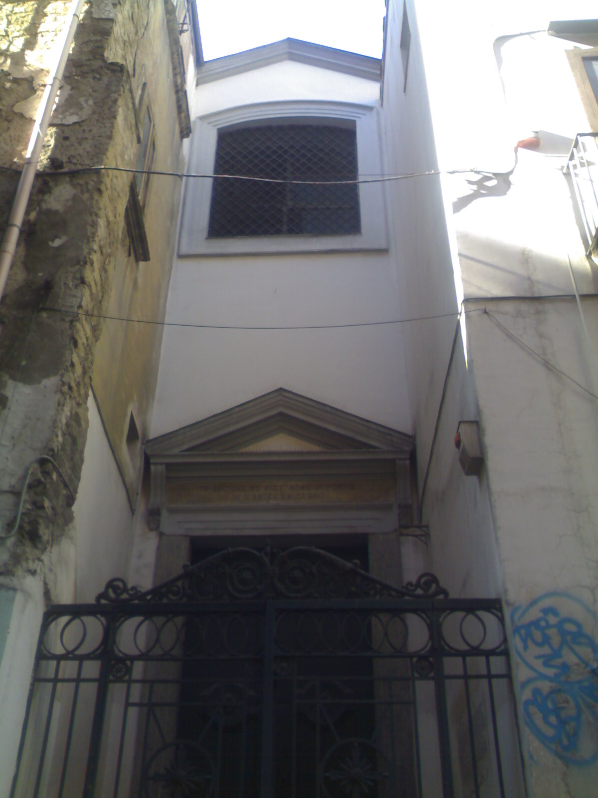 Chiesa di Sant'Angelo a Segno(Napoli)